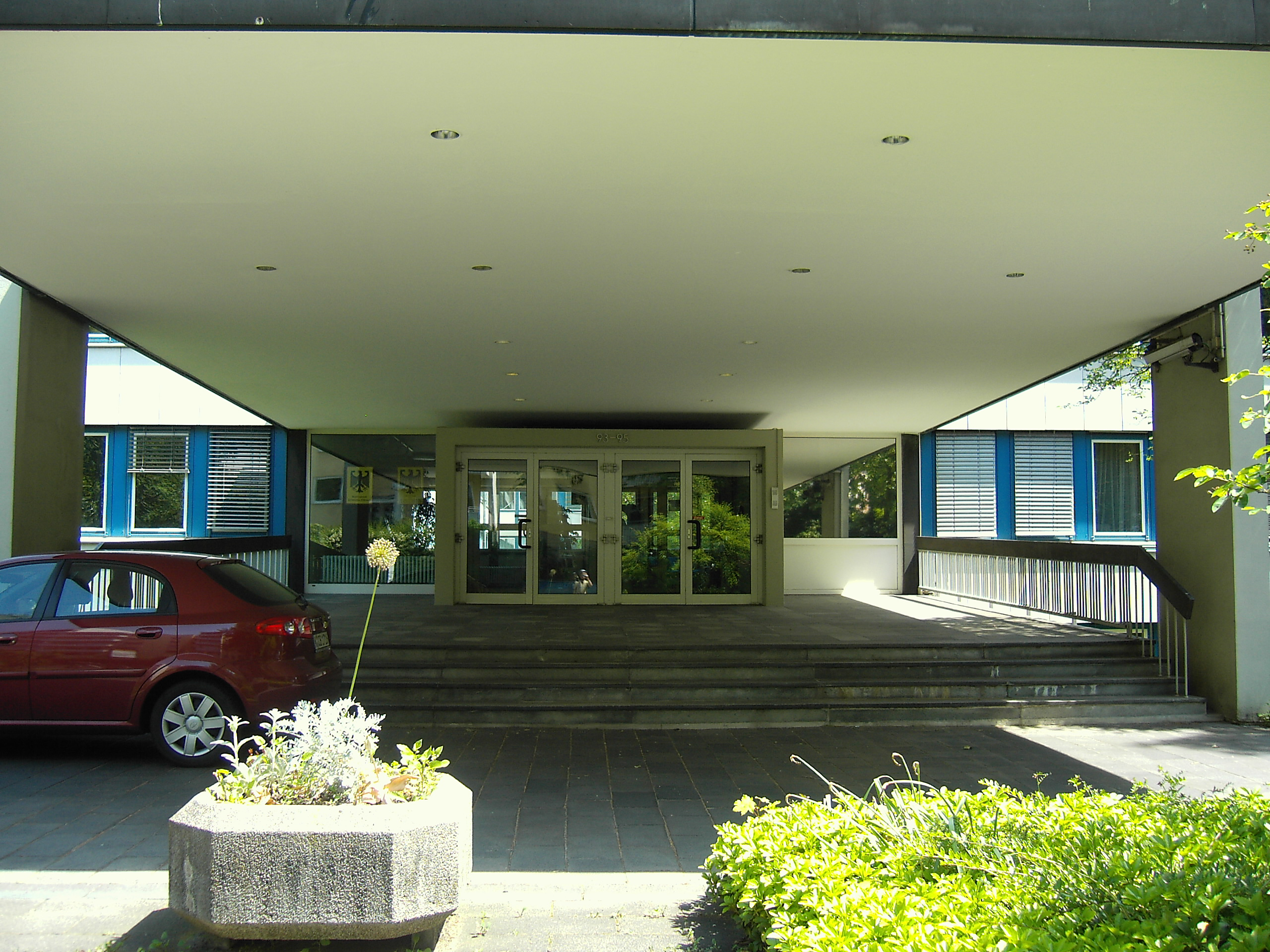 Eingang zum Bundesamt für Bevölkerungsschutz und Katastrophenhilfe und der Bundesansalt Technisches Hilfswerk in Bonn-Bad Godesberg, Deutschherrenstraße 93–95.